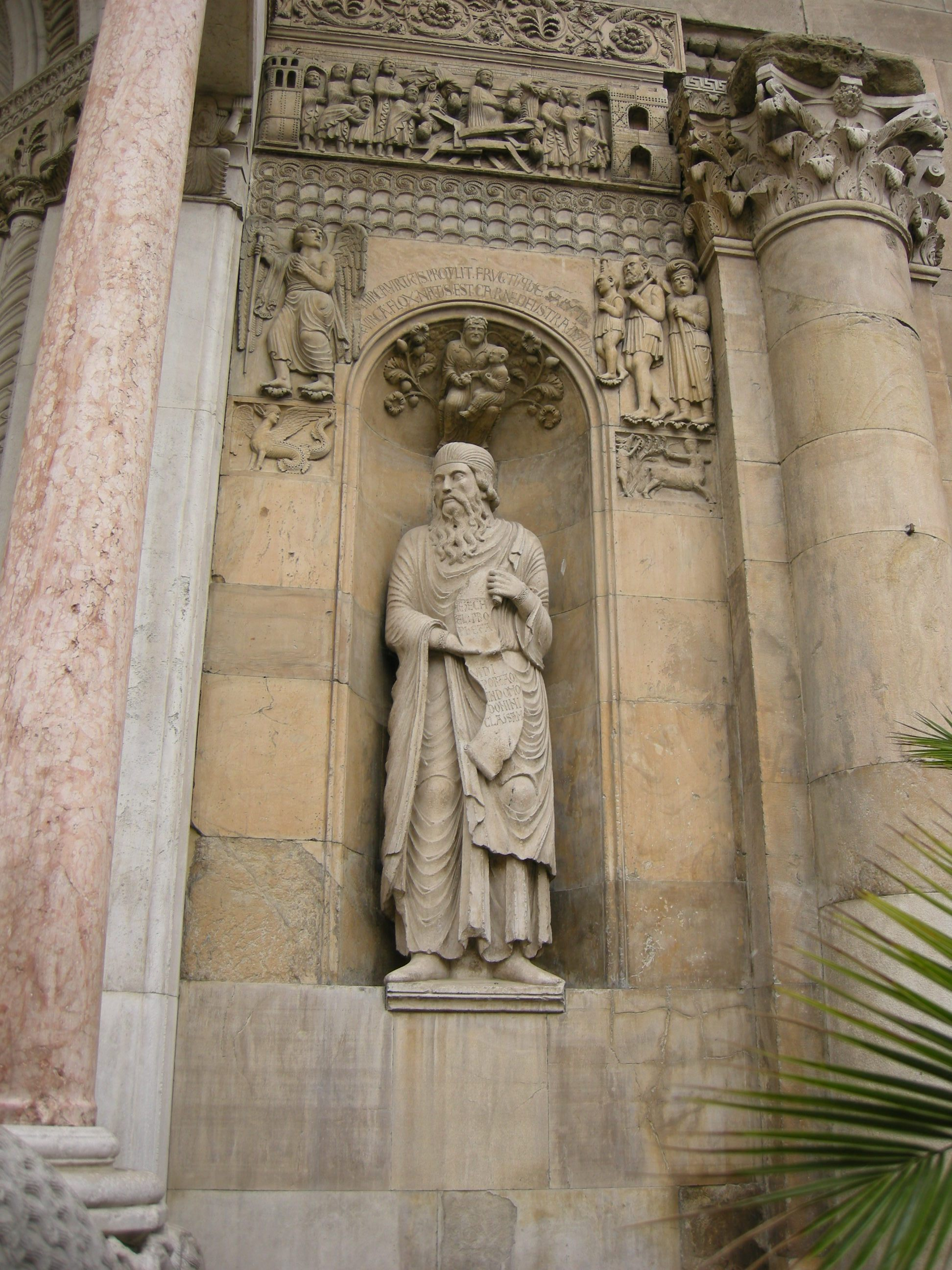 Duomo di fidenza, sculture a dx del portale c.le, ezechiele, attr. antelami